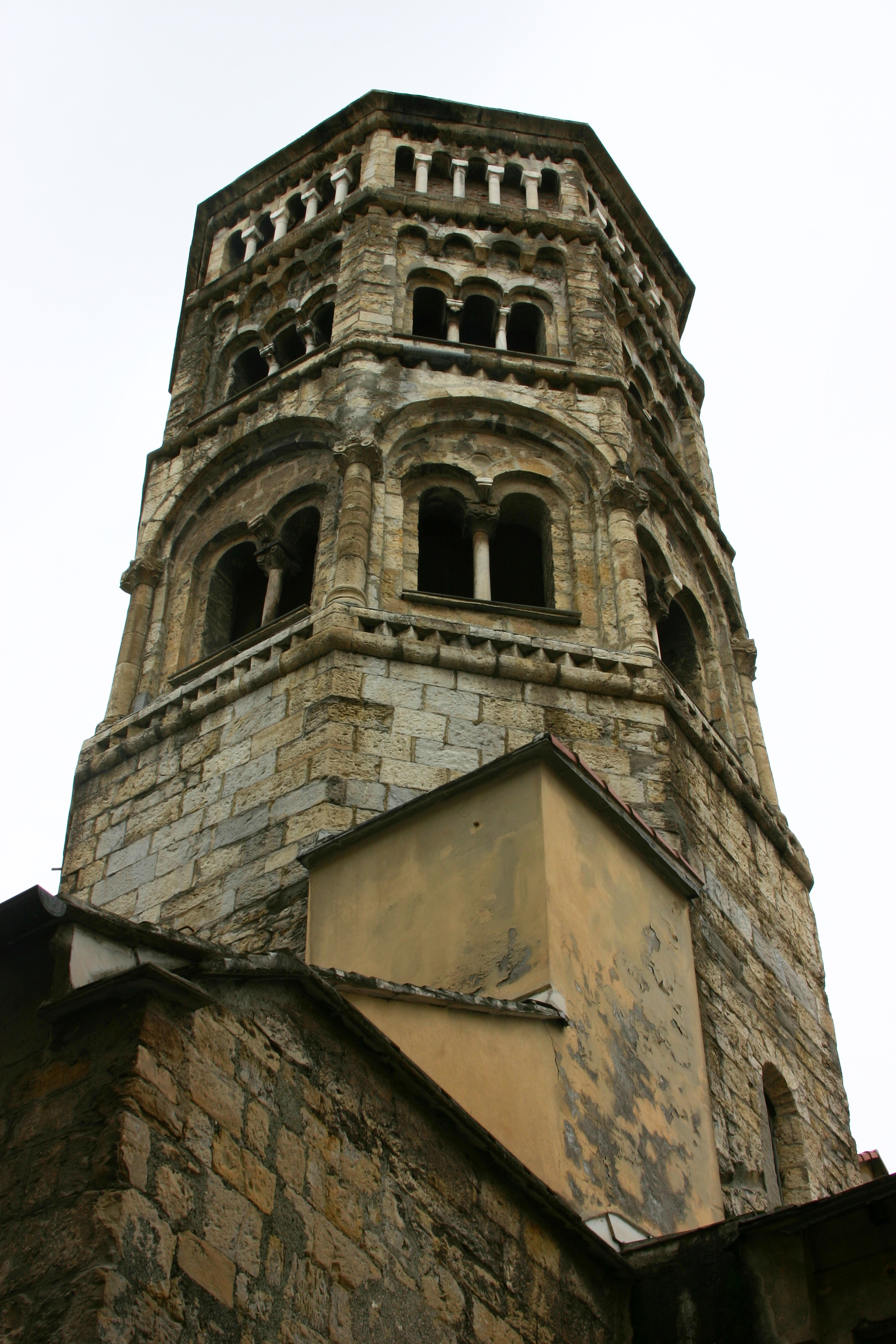 Igreja de San Donato - Gênova